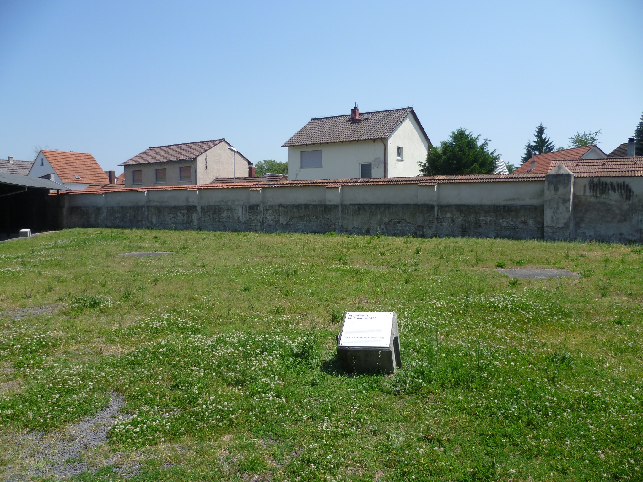 Ehemaliger Appellplatz des KZ Osthofens